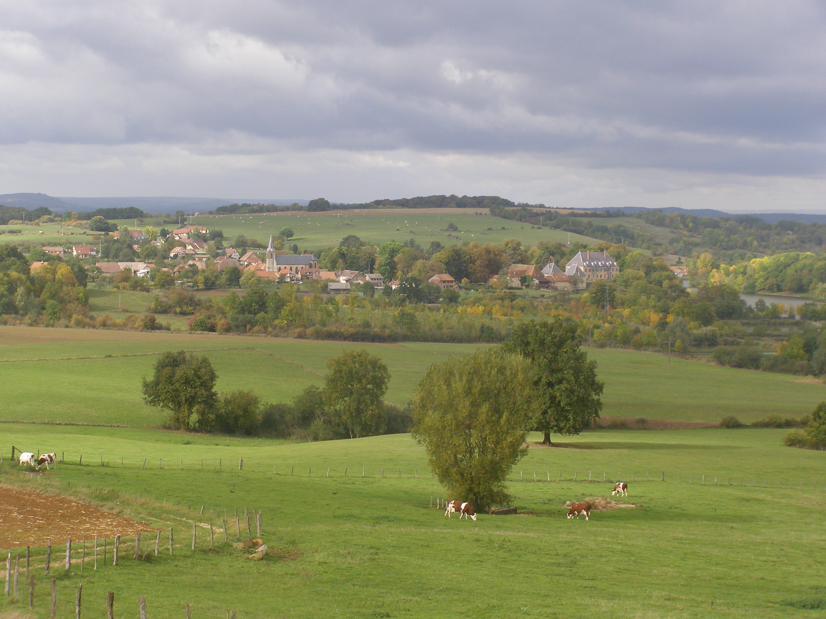 Vue générale de Fallon (70).